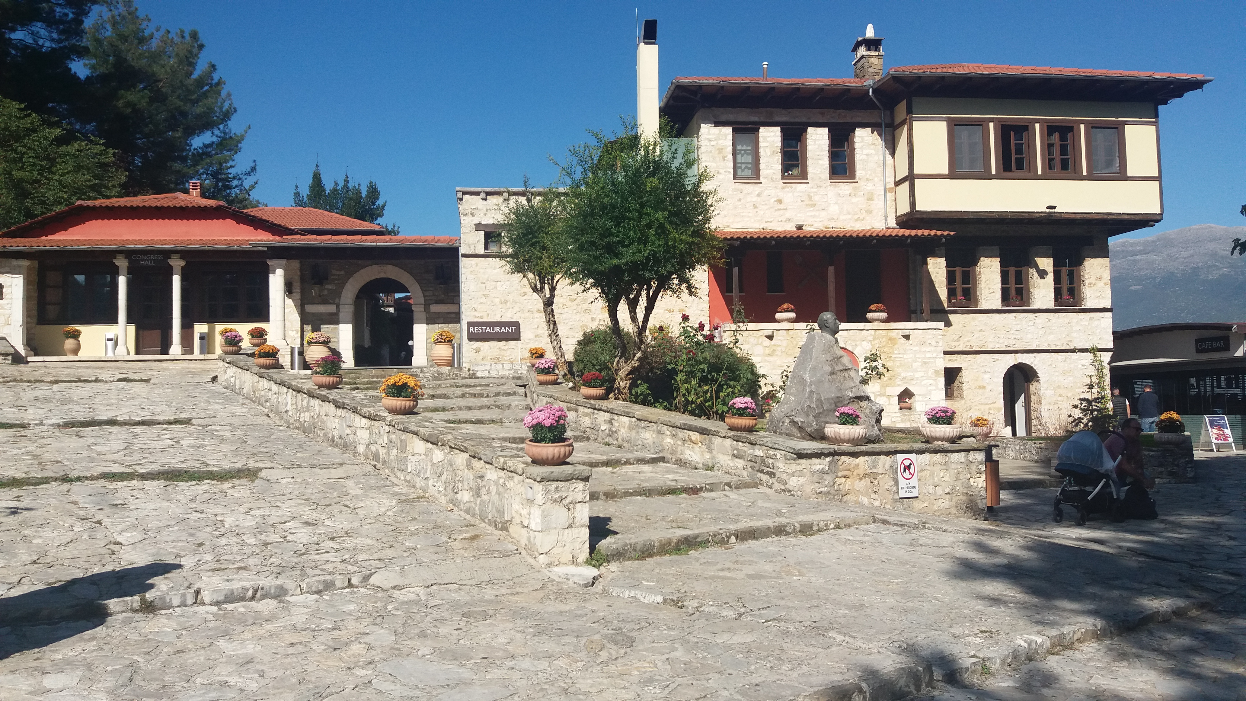 Το Τουριστικό Περίπτερο Εταιρείας Ηπειρωτικών Μελετών ("Φρότζου")